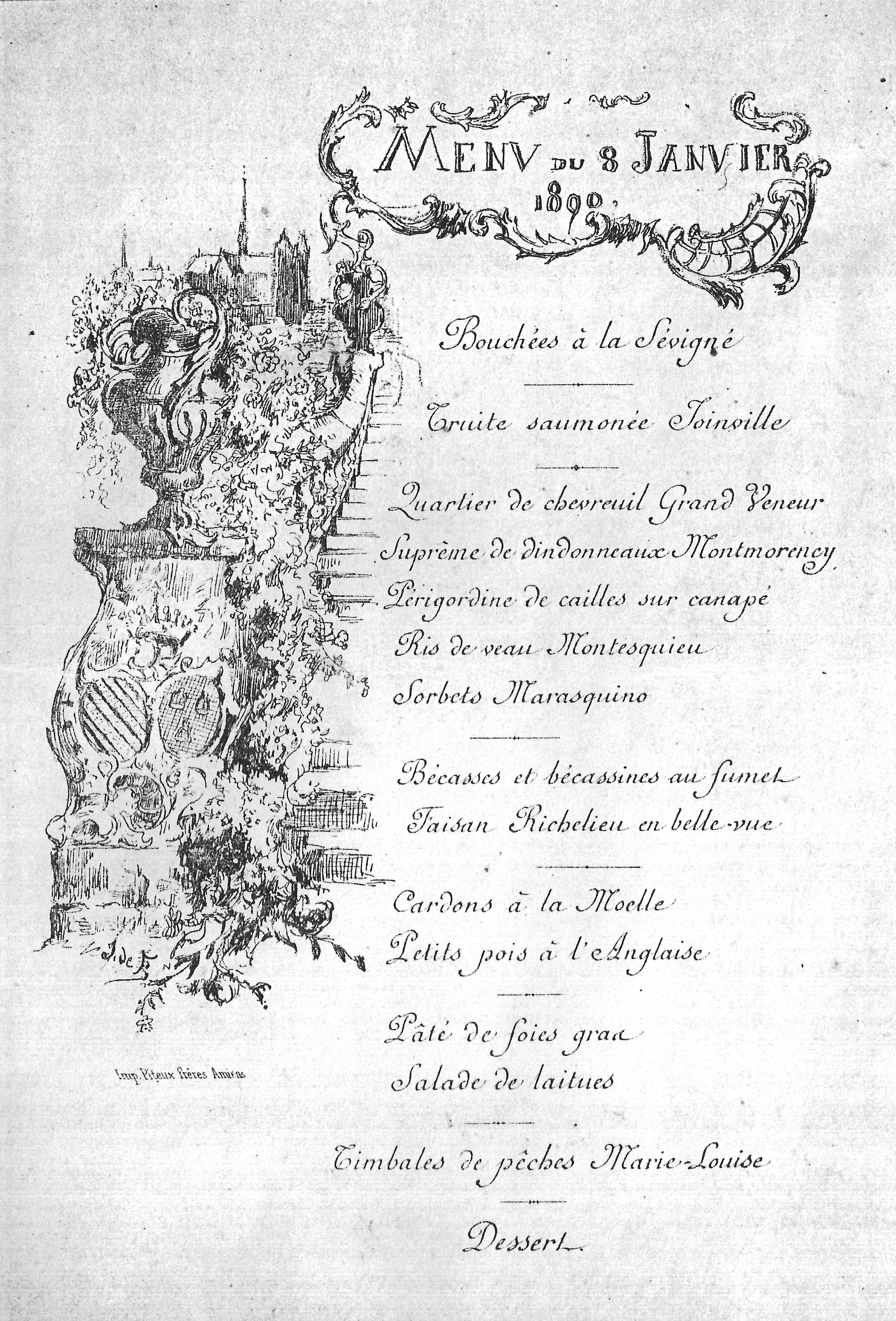 Menu 2 de 1800, avec dessin de Jean de Francqueville né en 1860.